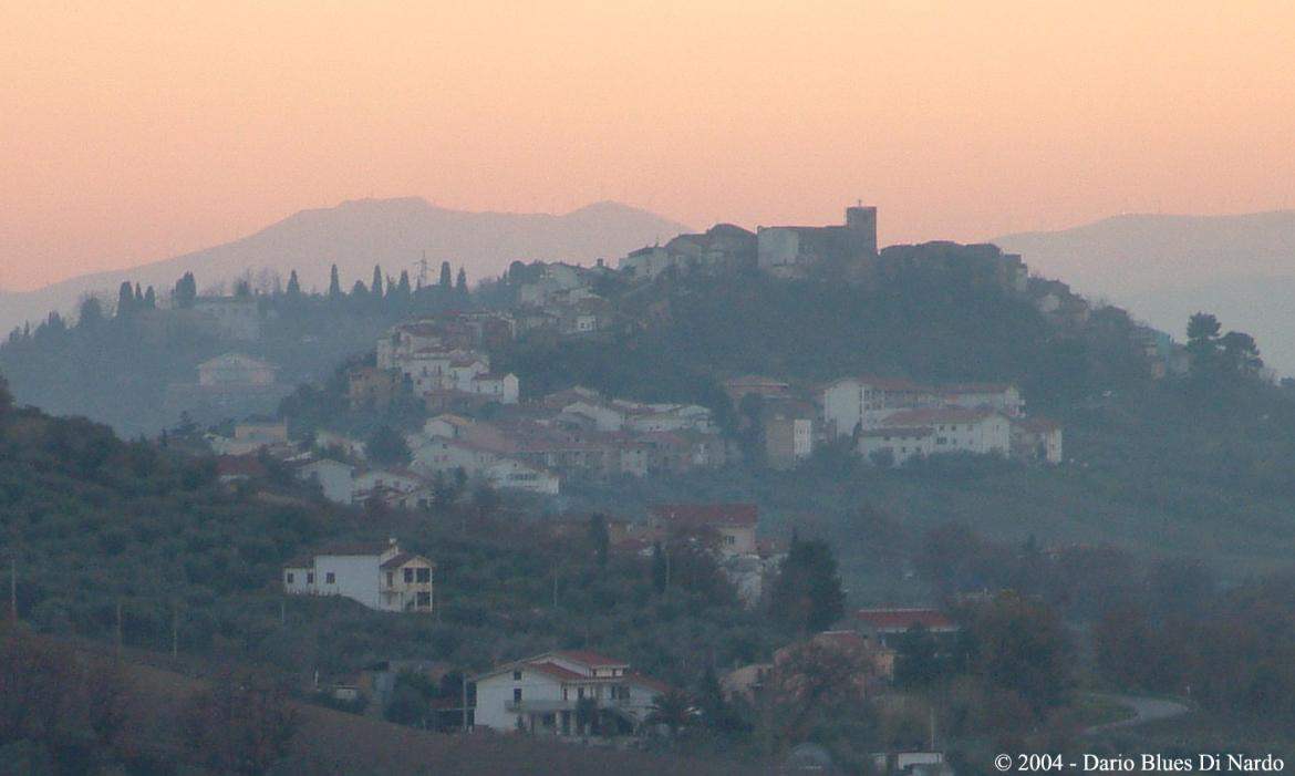 Dario Blues Di Nardo, foto propria, Torino di Sangro vista Nord-Est